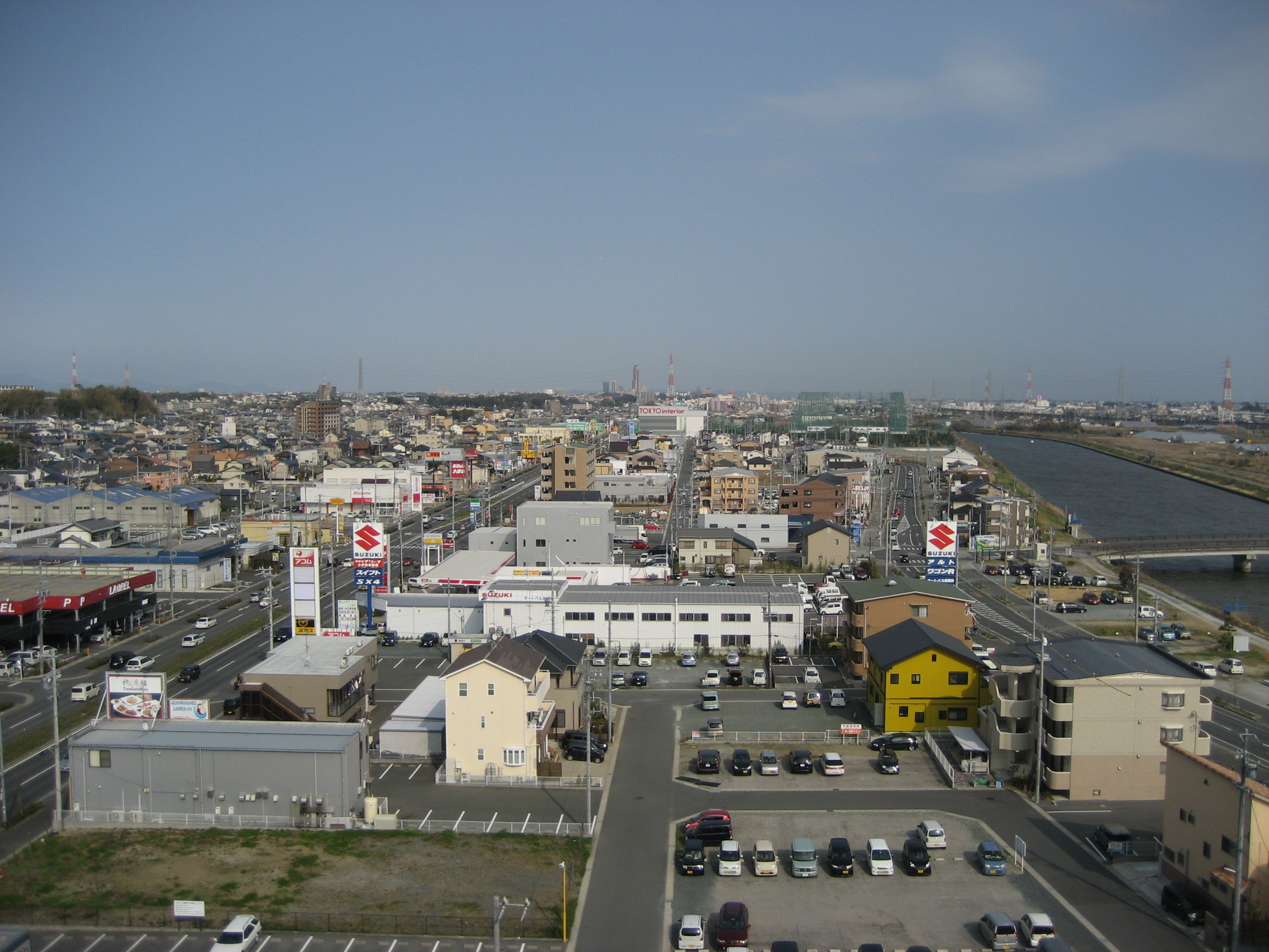 Nishi Ward, Hamamatsu City